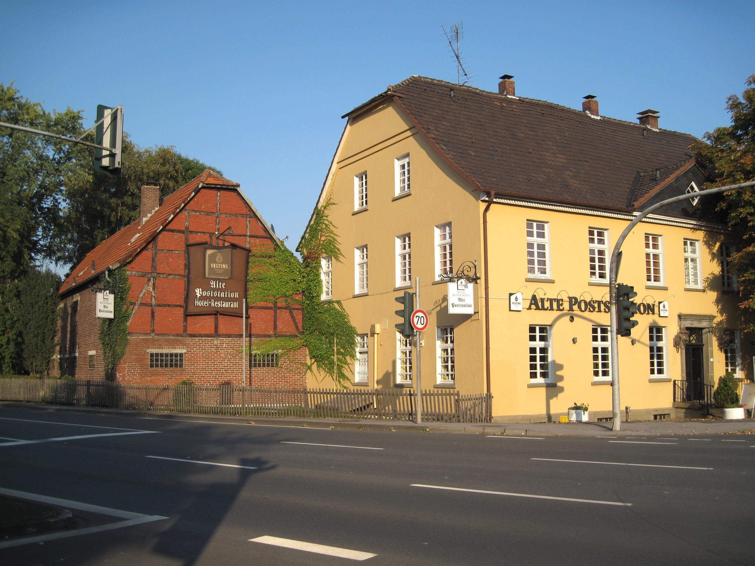 Alte Poststation, Arnsberger Straße 1 in Wickede-Wimbern. This image shows a heritage building in Germany, located in the North Rhine-Westphalian city Wickede (Ruhr) (no. 5).